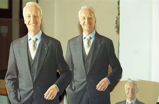 Politischer Aschermittwoch